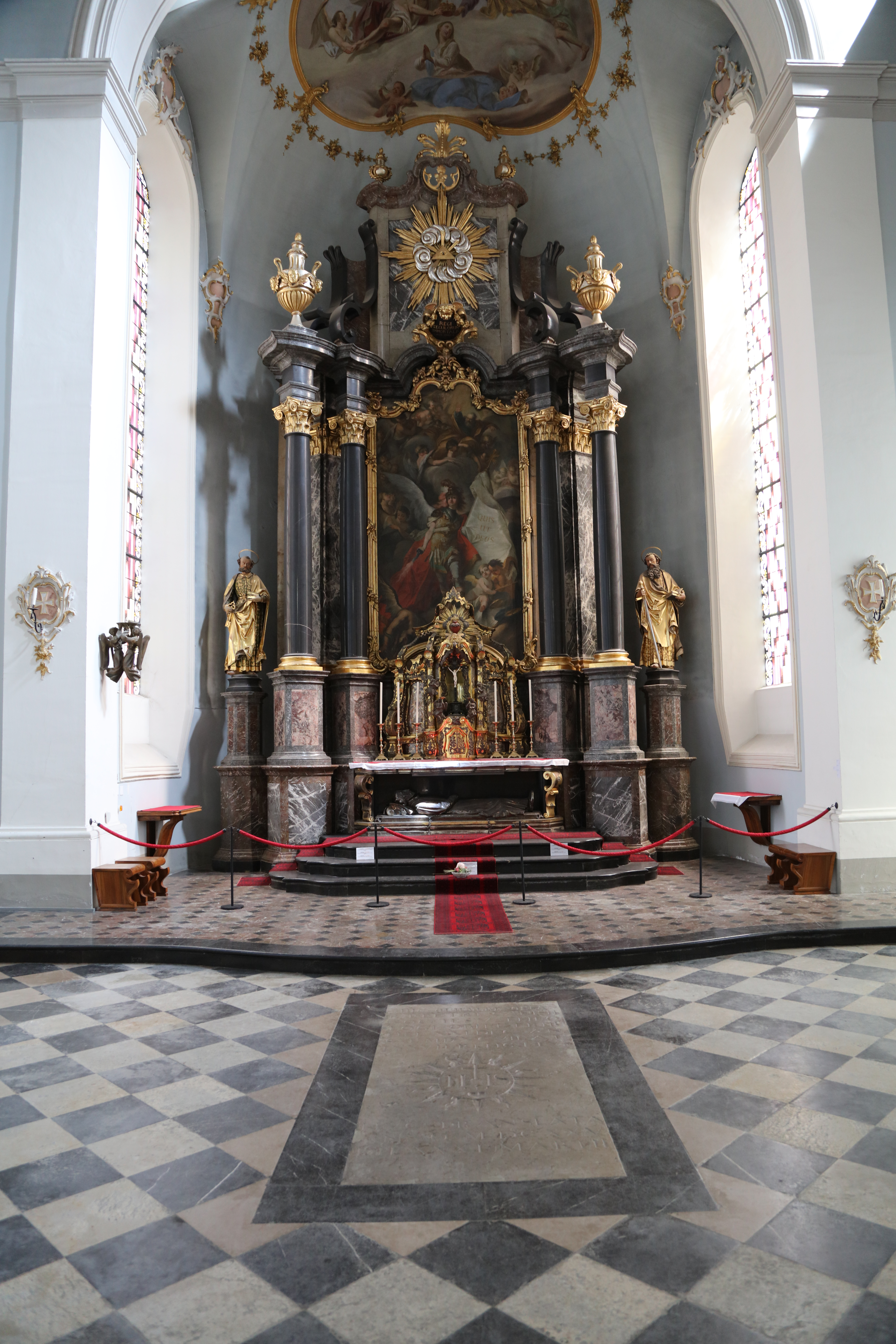 Der Hauptalter in der Kollegiumskirche St. Michael in Freiburg.